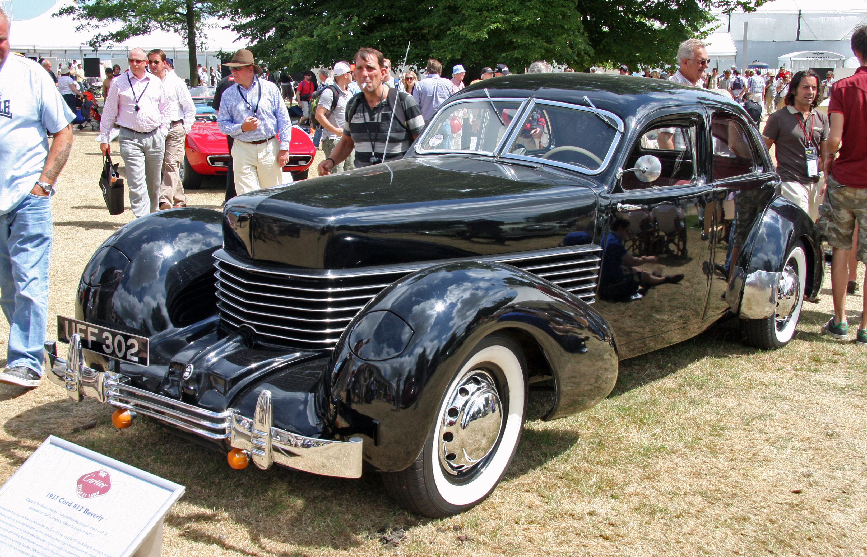 Goodwood 2009